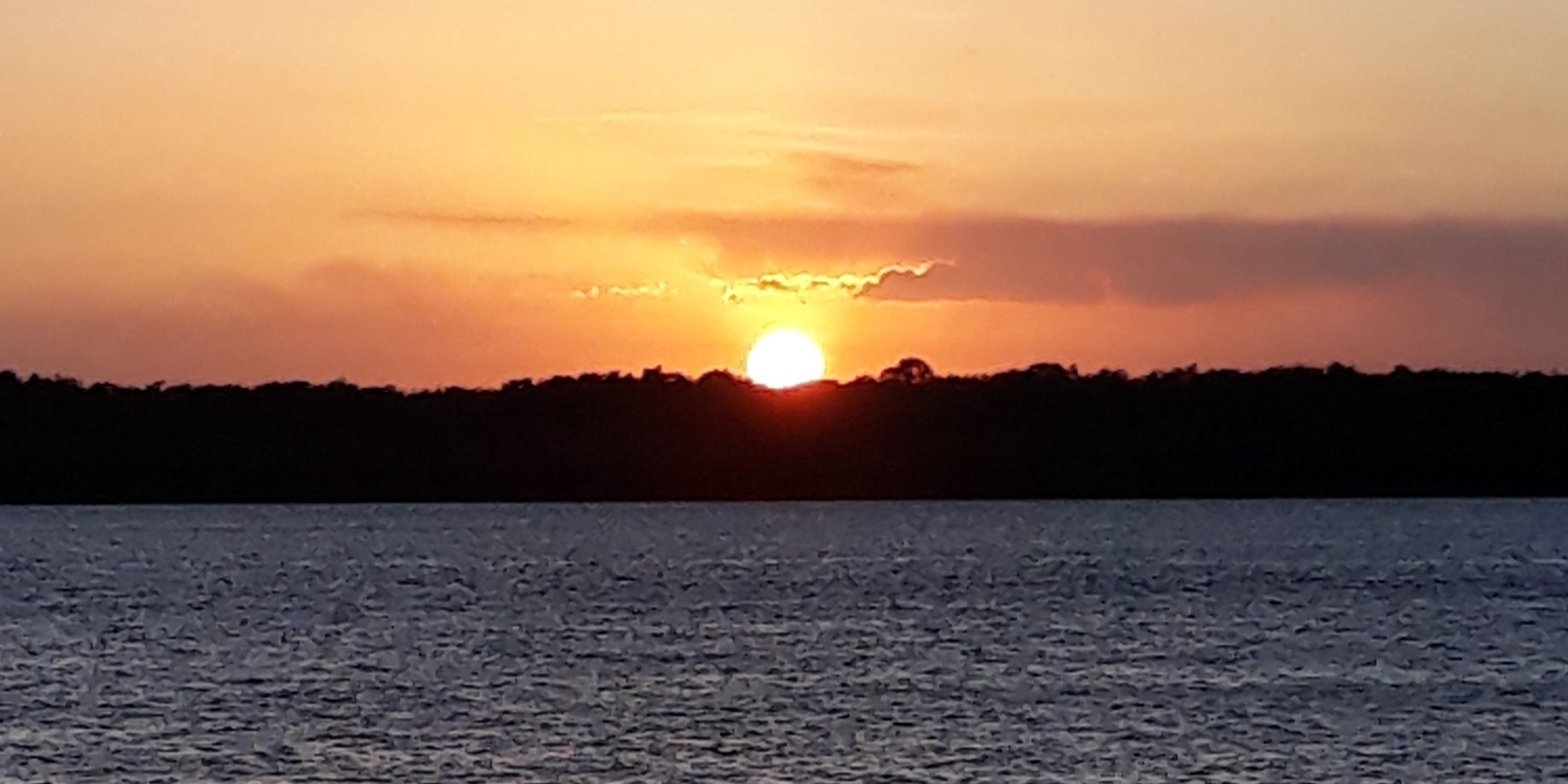 Pôr do sol na praia fluvial do Jacaré, no estuário do Rio Paraíba em Cabedelo, Paraíba (Brasil).